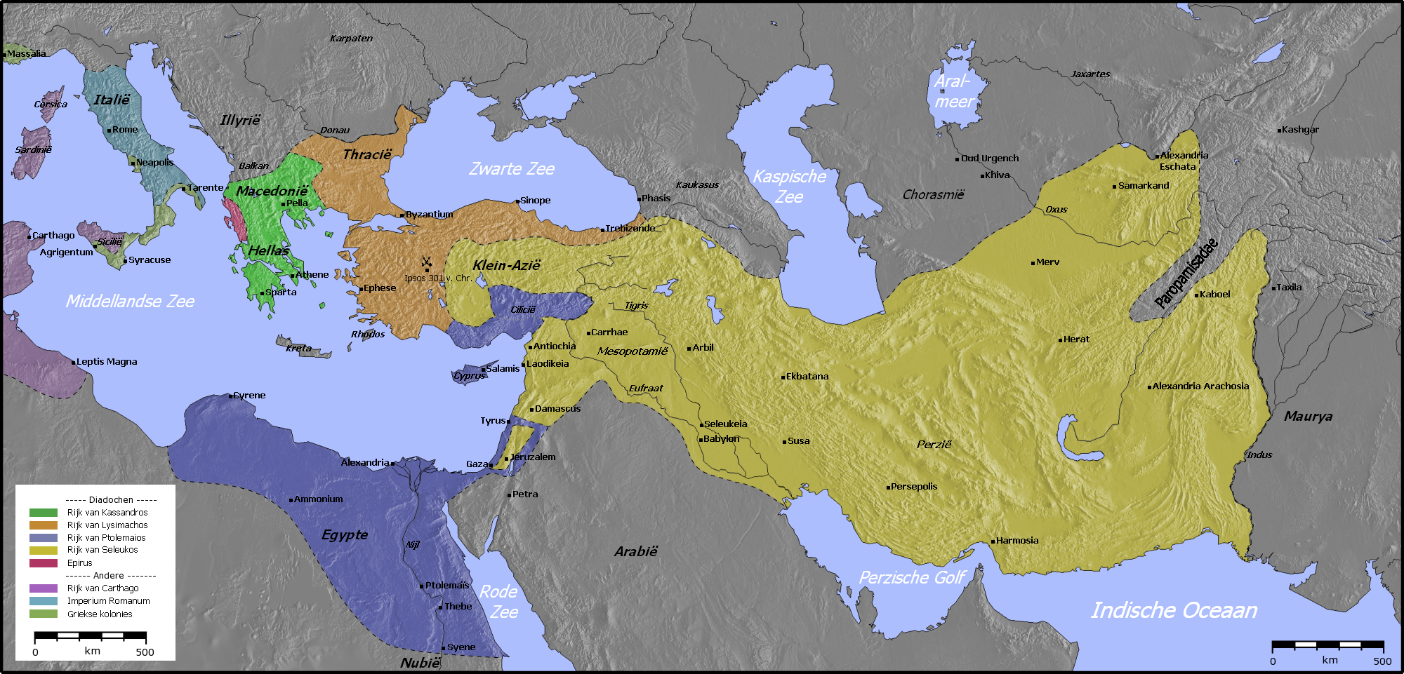 Kaart van de diadochenrijken (300 v. Chr.)